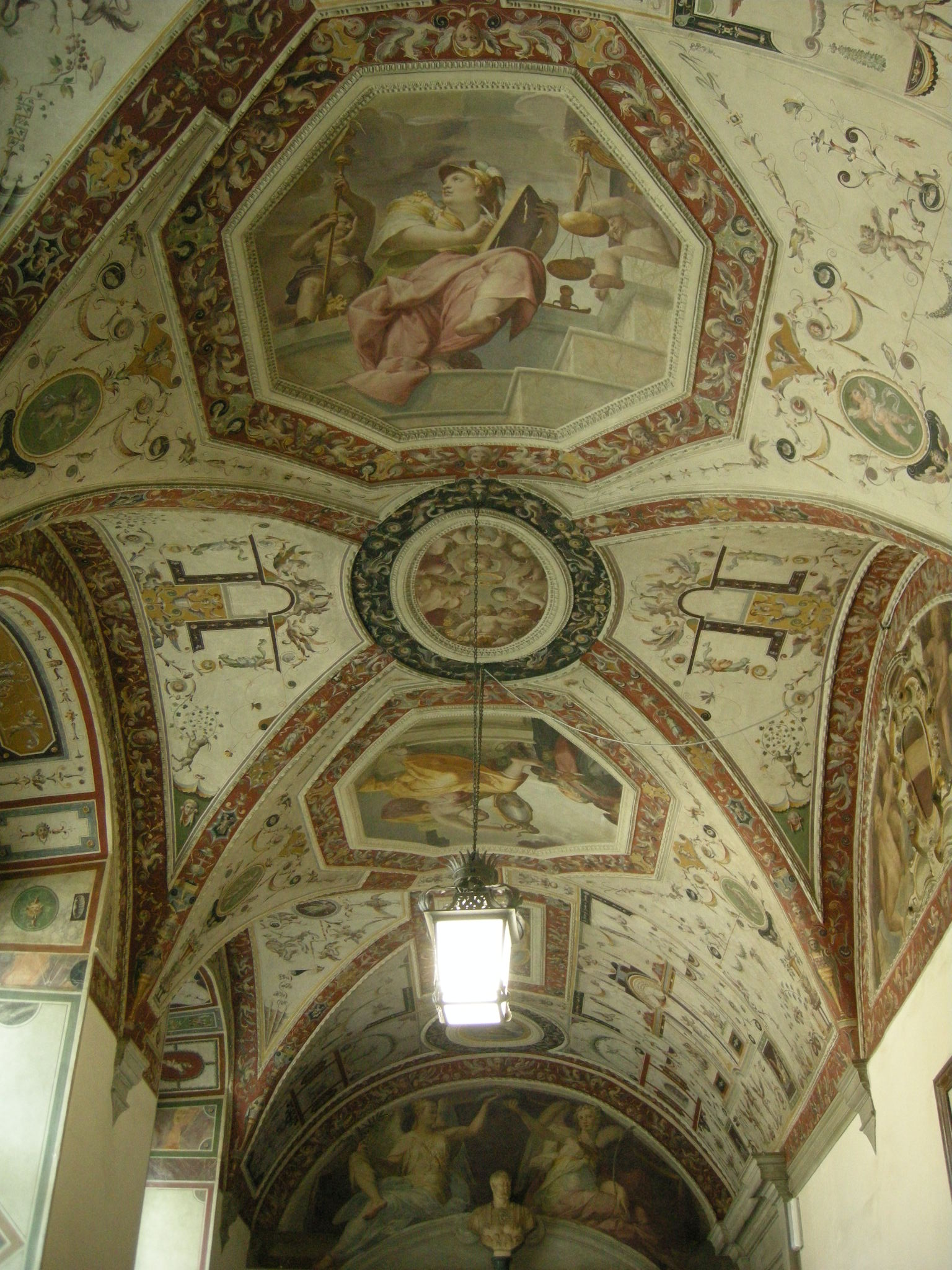 Pal vecchio, Ricetto (1565), affreschi di lorenzo sabatini